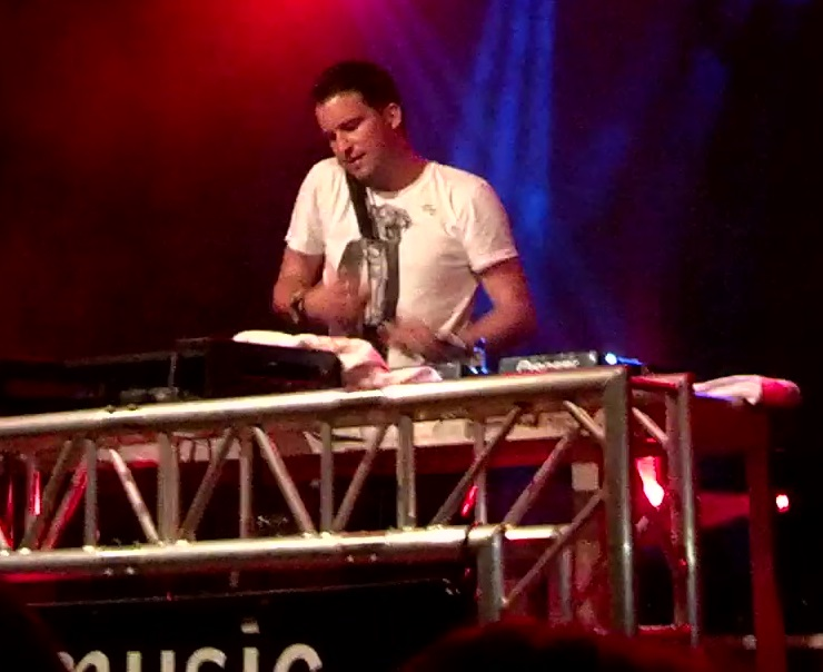 DJ Antoine am 27.04.13 live im Pahlazzo, Phalen.